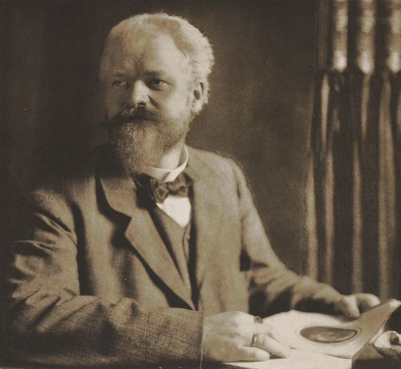 Hugo Erdmann, 1907, Foto von Rudolf Dührkoop.